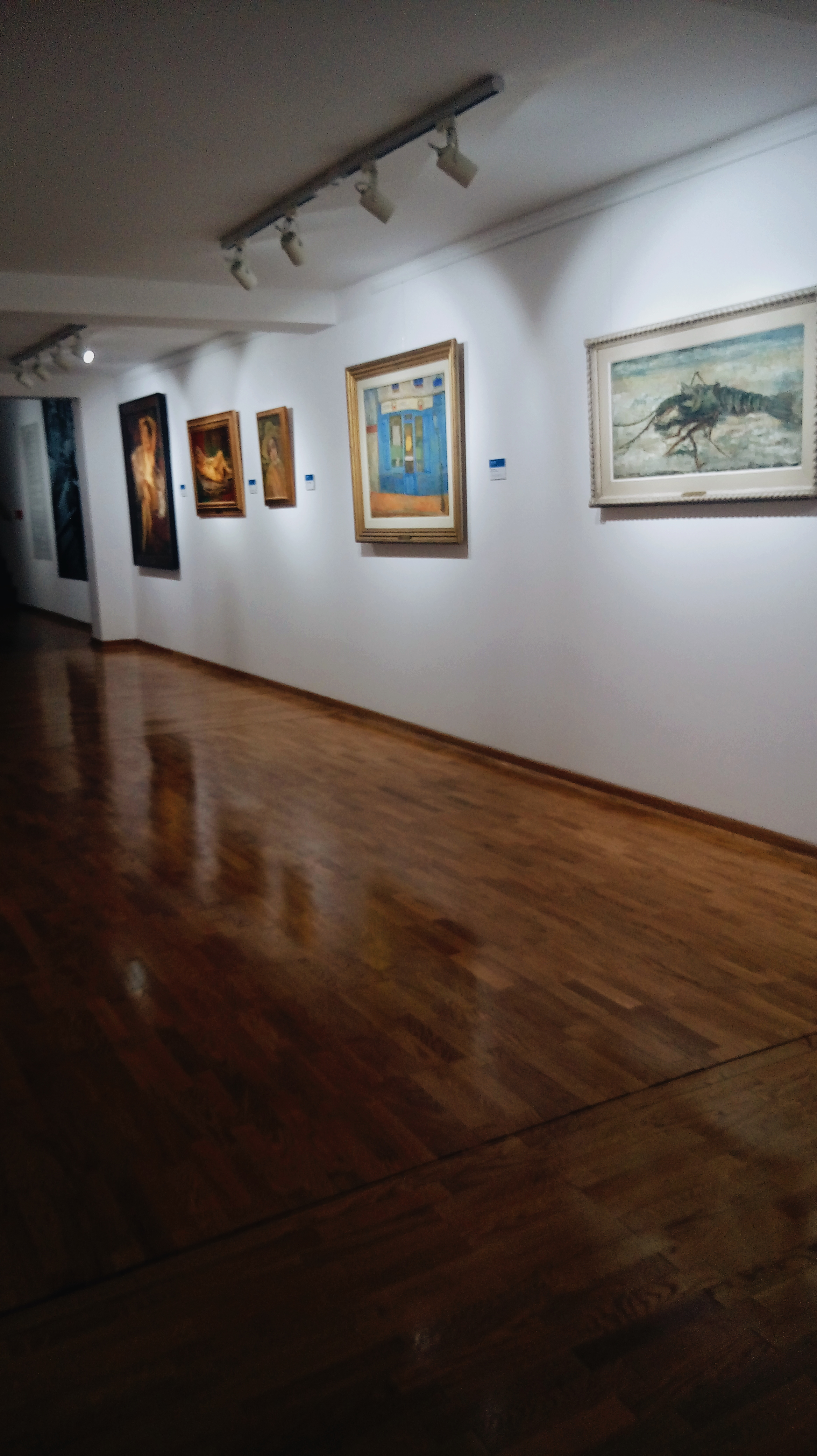 Сликар Владимир Дуњић излагао у галерији Андрићевог института.